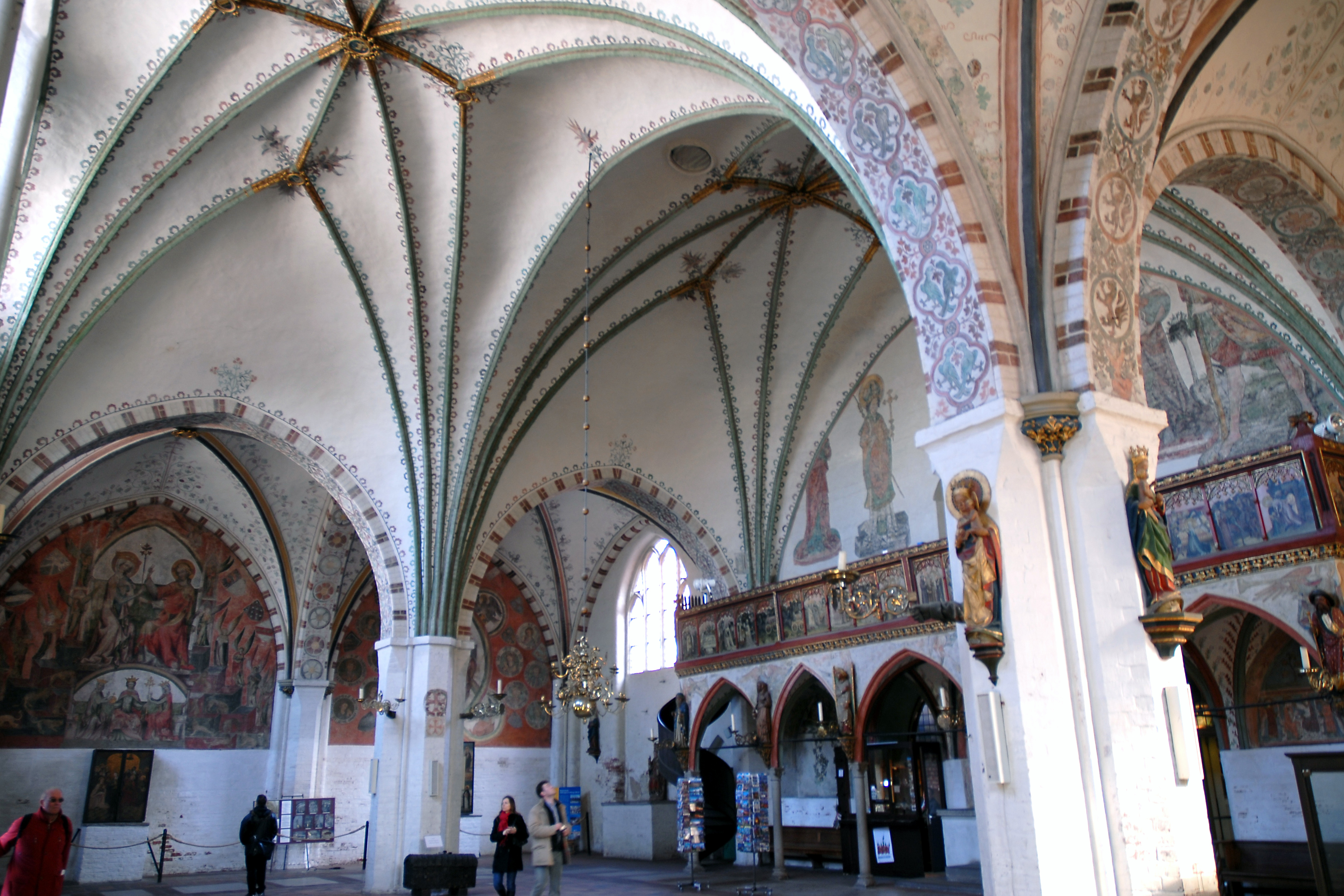 Heiligen-Geist-Hospital in Lübeck, Innenansicht